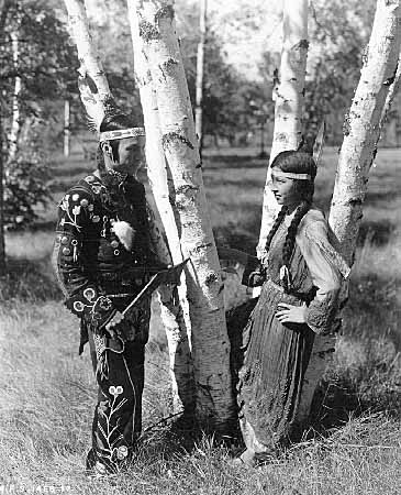 Ojibwe costumes